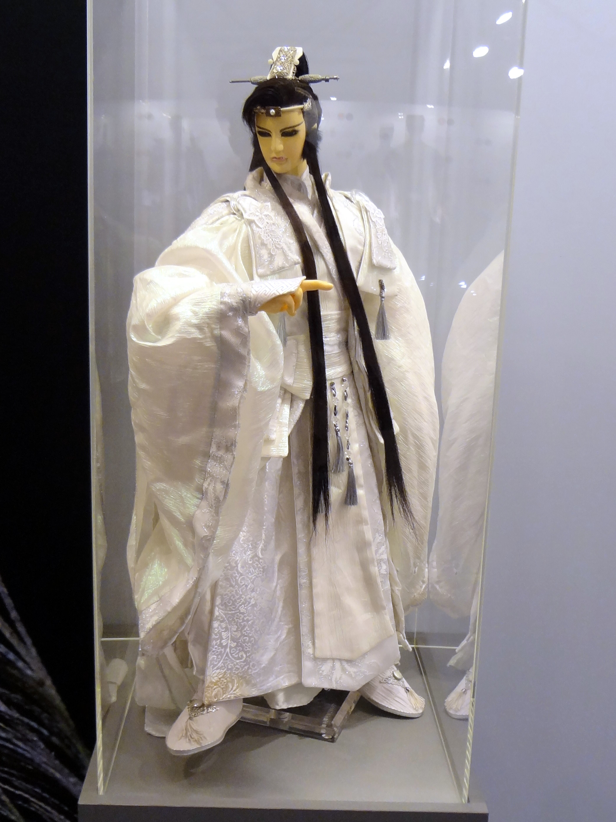 松山文化創意園區「金鐘五十．響 特別展」展示的史艷文戲偶。